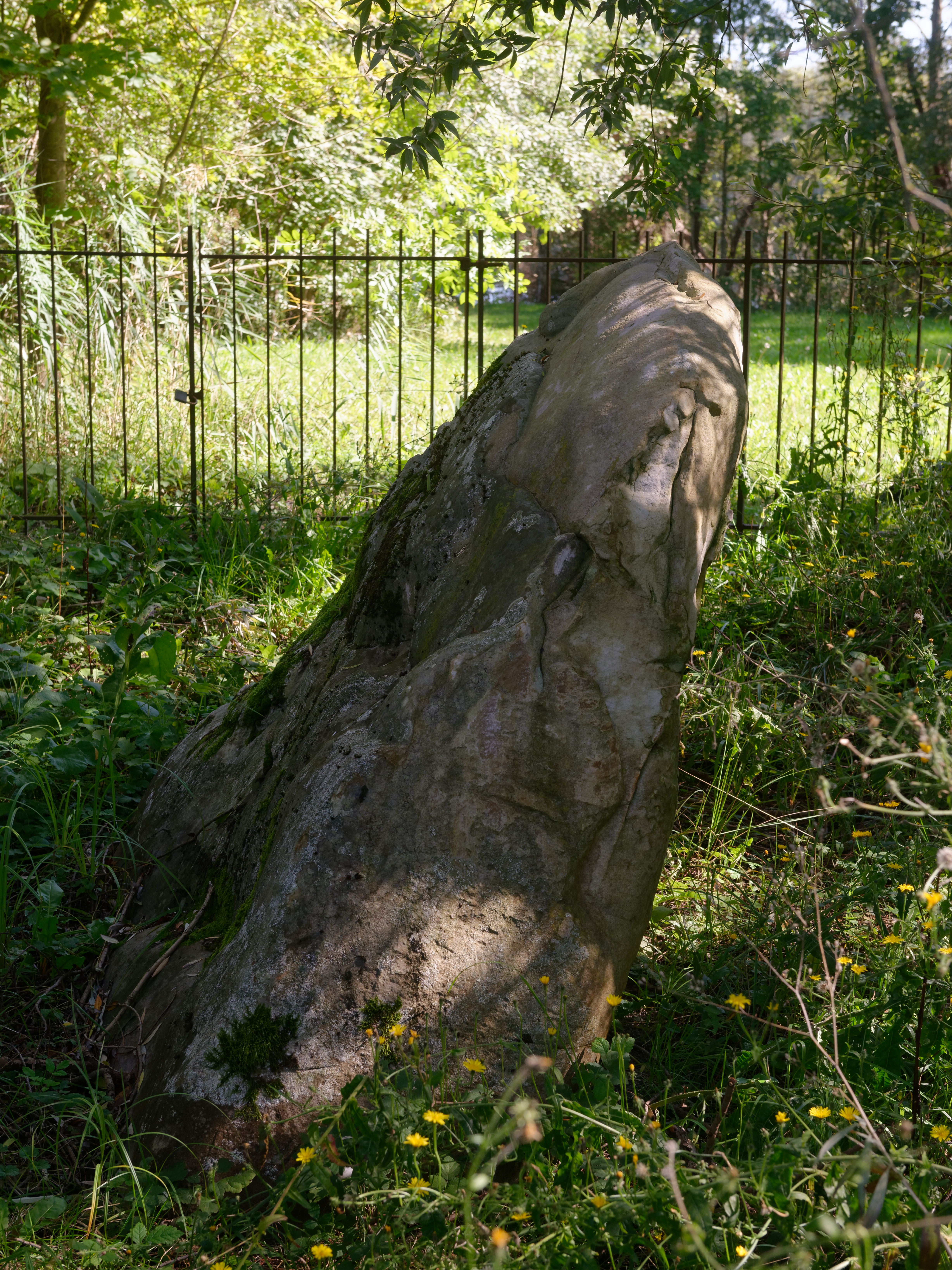 Menhir dit de la Pierre Beaumirault, datant du Néolithique, situé sur une presqu'île du bassin de Trévoix à Bruyères-le-Châtel dans l'Essonne.